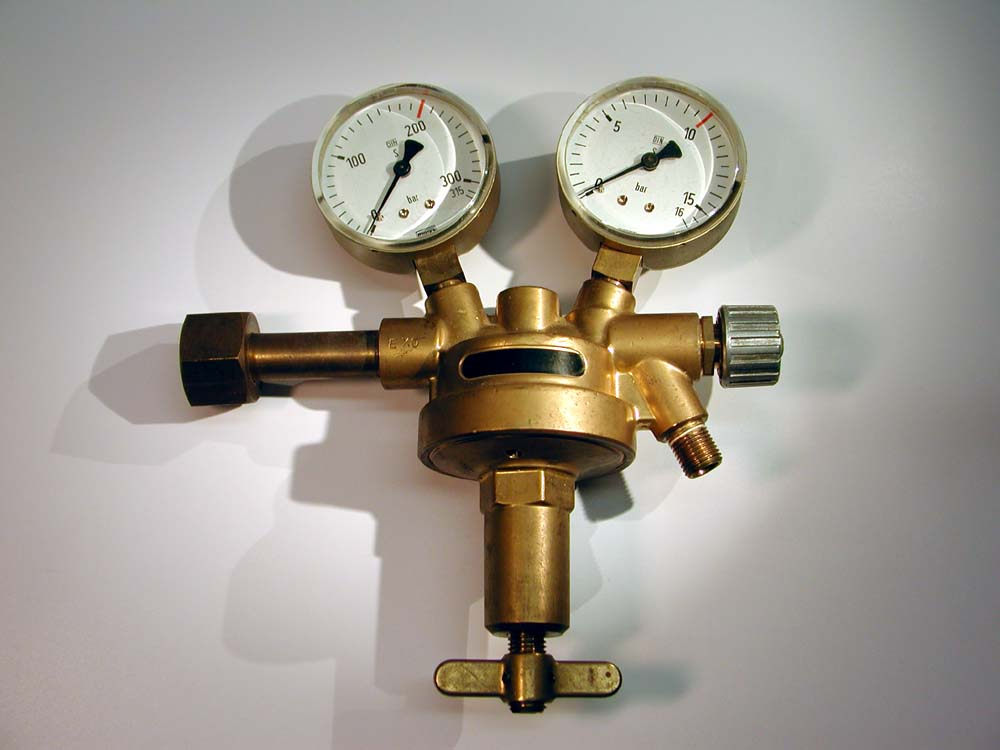 Druckminderer groß Dieses Bild ist von Gert Wrigge & Ilja Gerhardt im November 2003 aufgenommen worden. Es steht unter der GNU FDL & ist frei verfügbar.